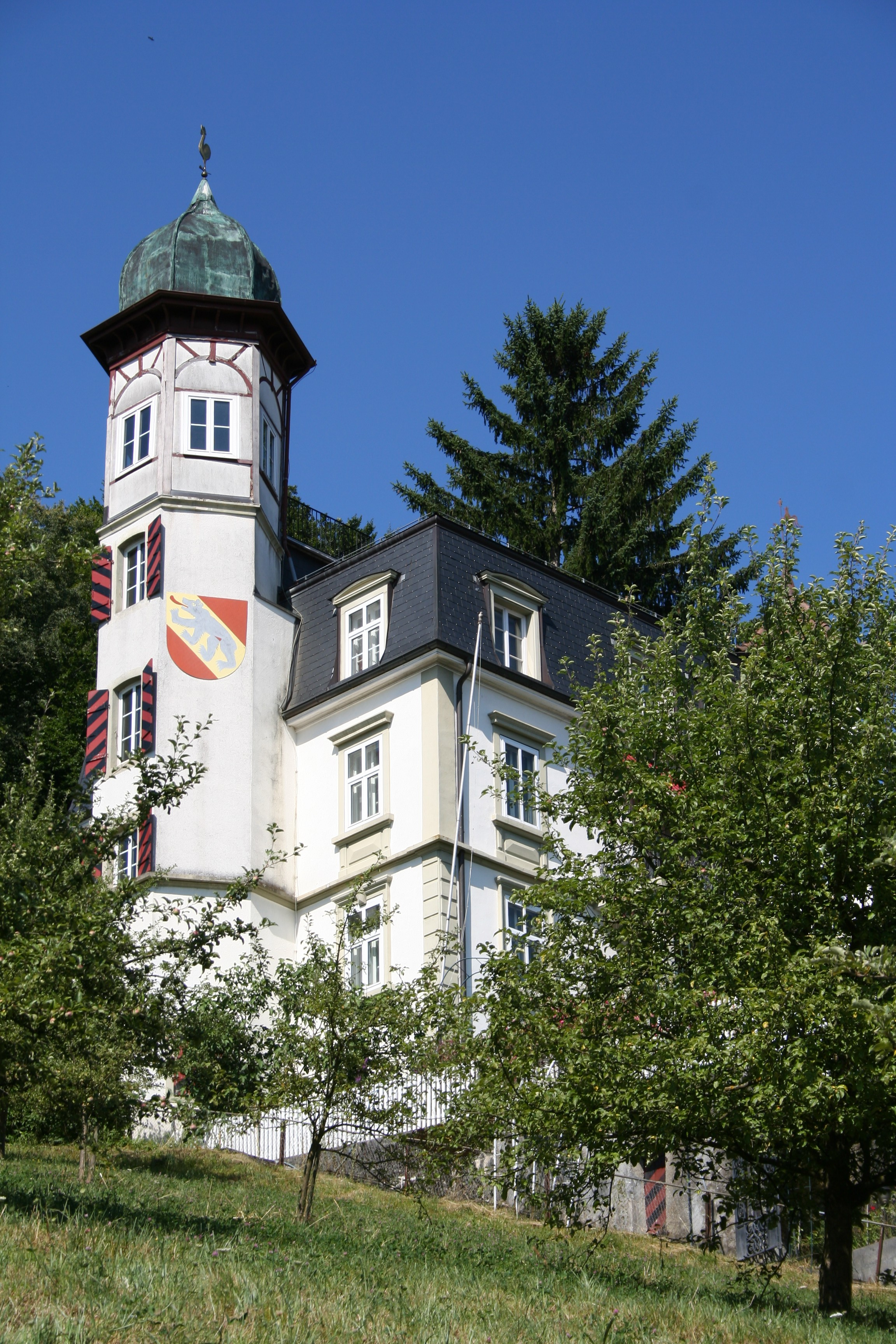 Das Schlössli von Dotzigen, Schweiz